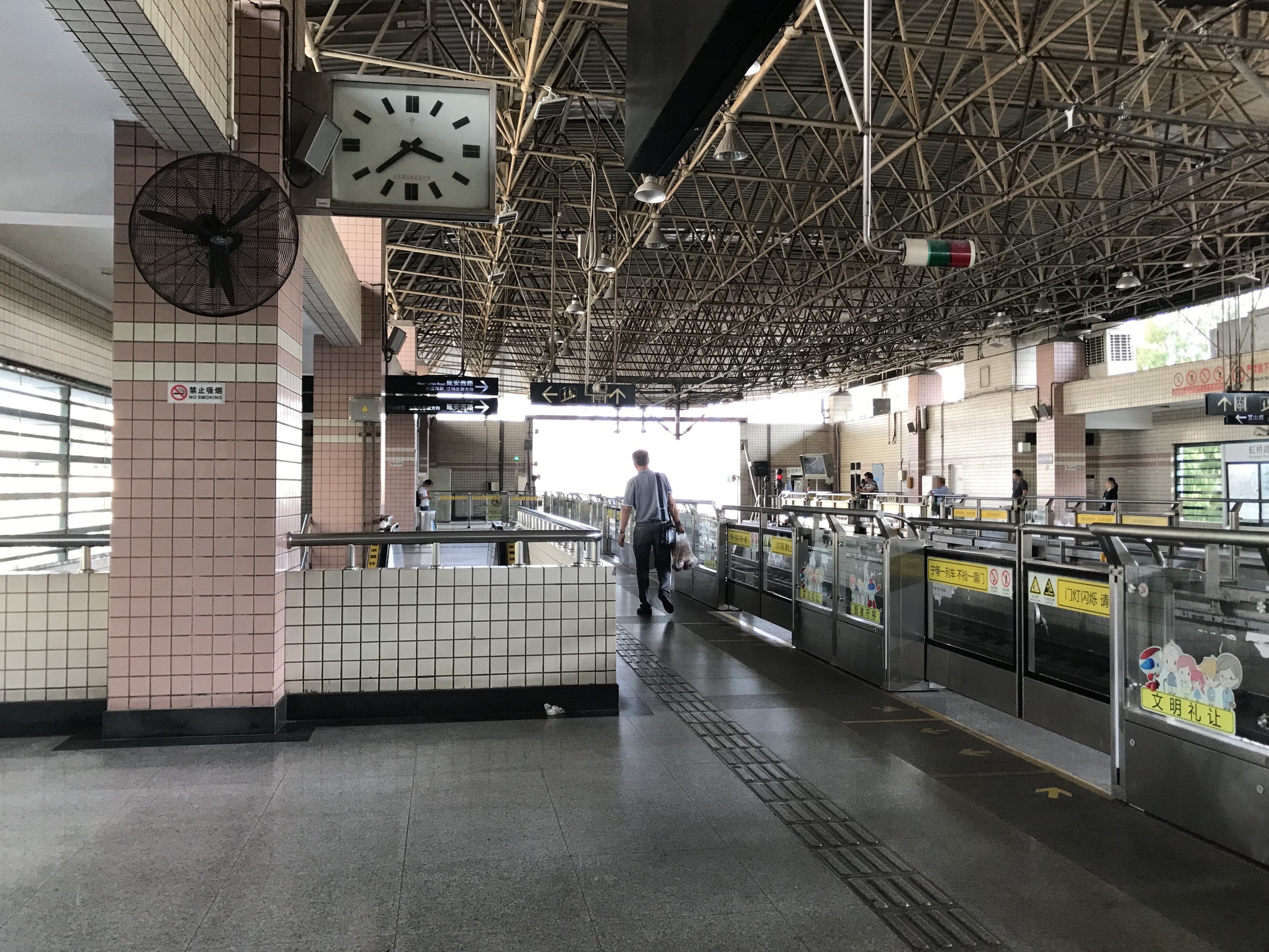 虹橋路駅(上海地下鉄3・4号線)のホーム